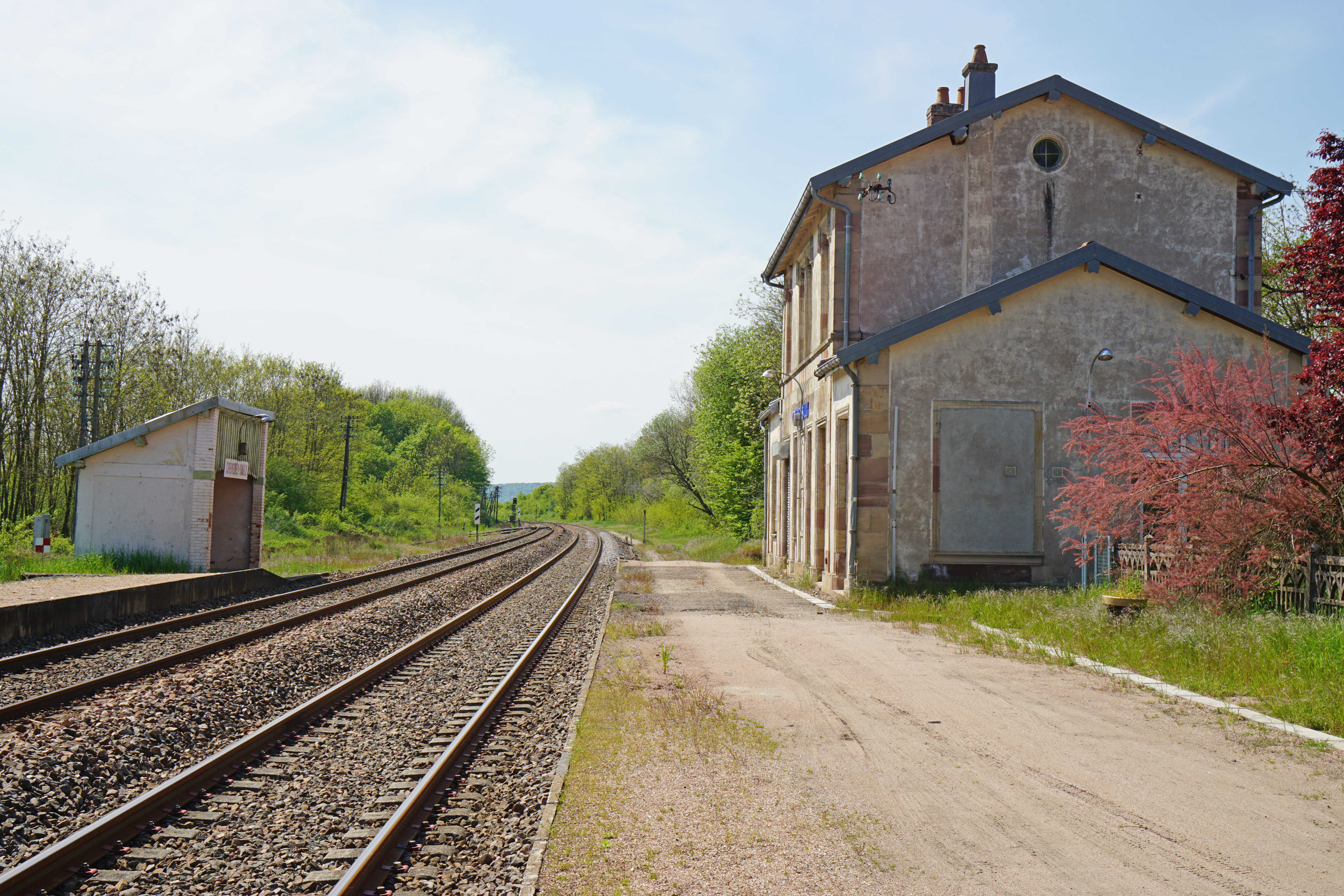 La gare désaffectée de Creveney - Saulx.